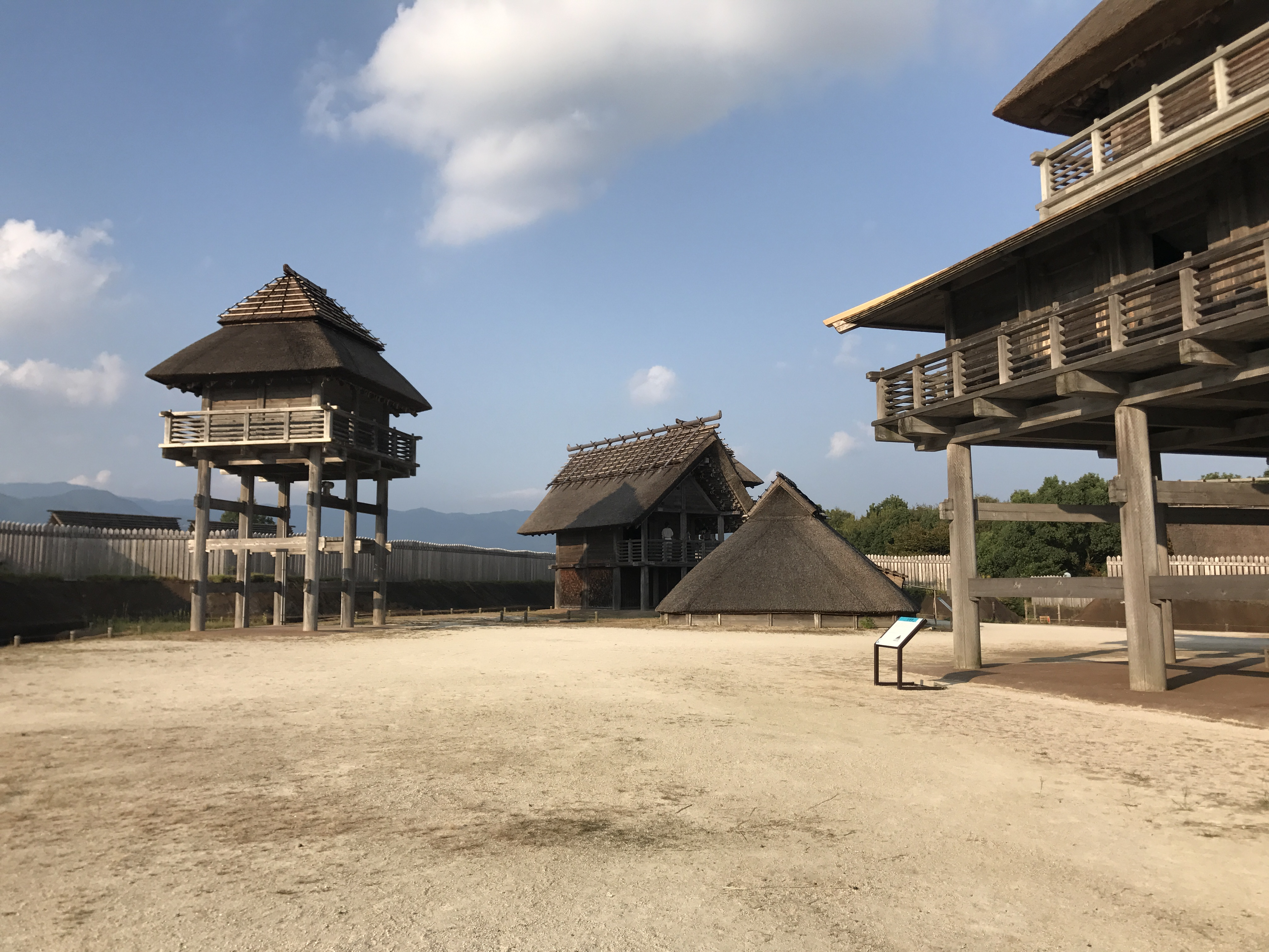 吉野ヶ里歴史公園・北内郭